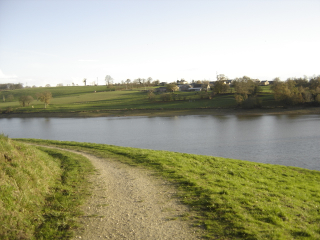 vue du plan d'eau du barrage - Ille-et-Vilaine